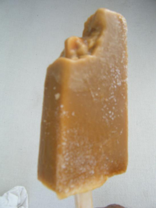 Paletas de cajeta: Las mejores de la región.